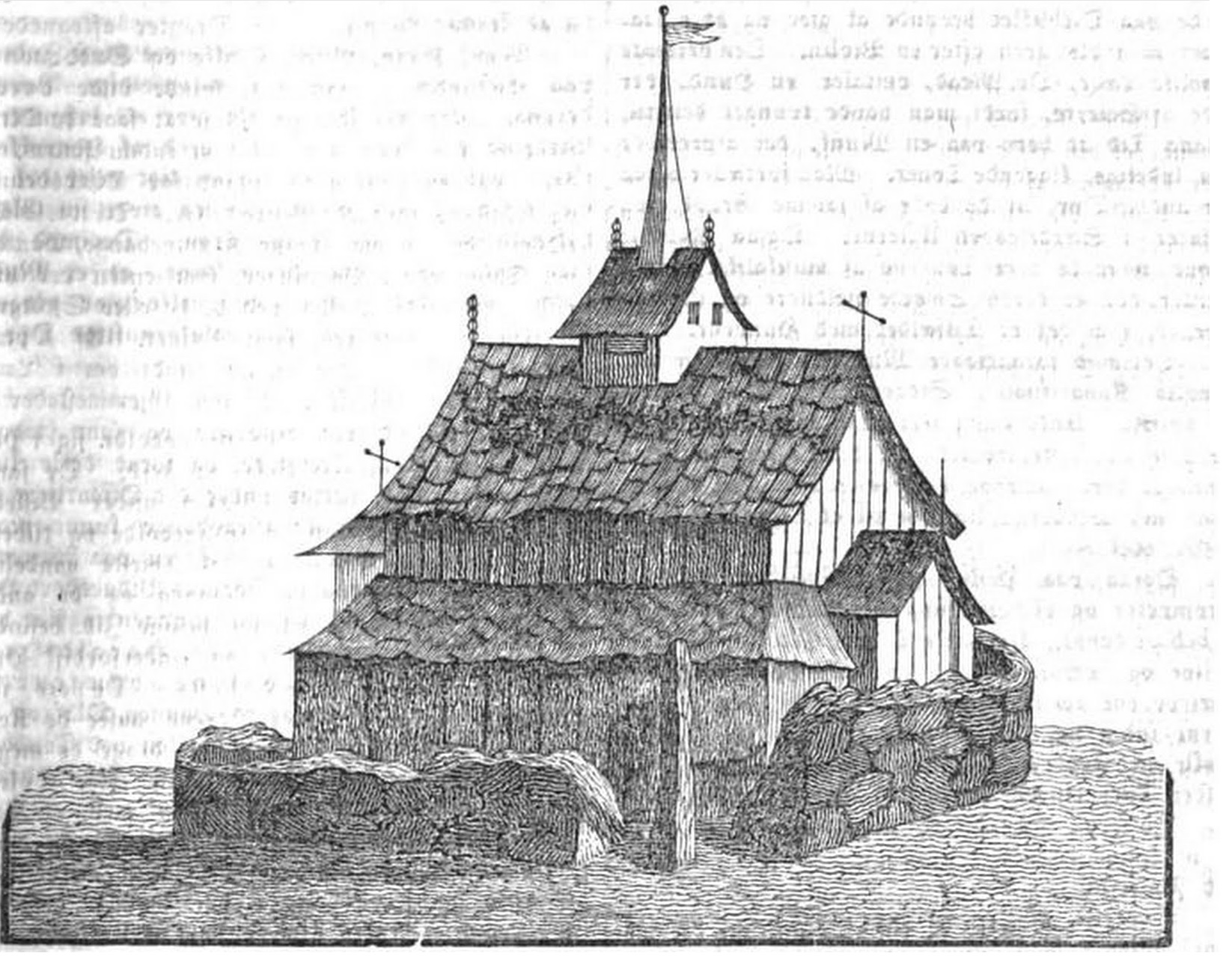 Tegning av Gåra stavkirke, Skilling Magazin nr. 75, 1836